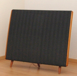 Quad elektrostatische luidspreker, gebouwd december 1973. In eigen bezit.